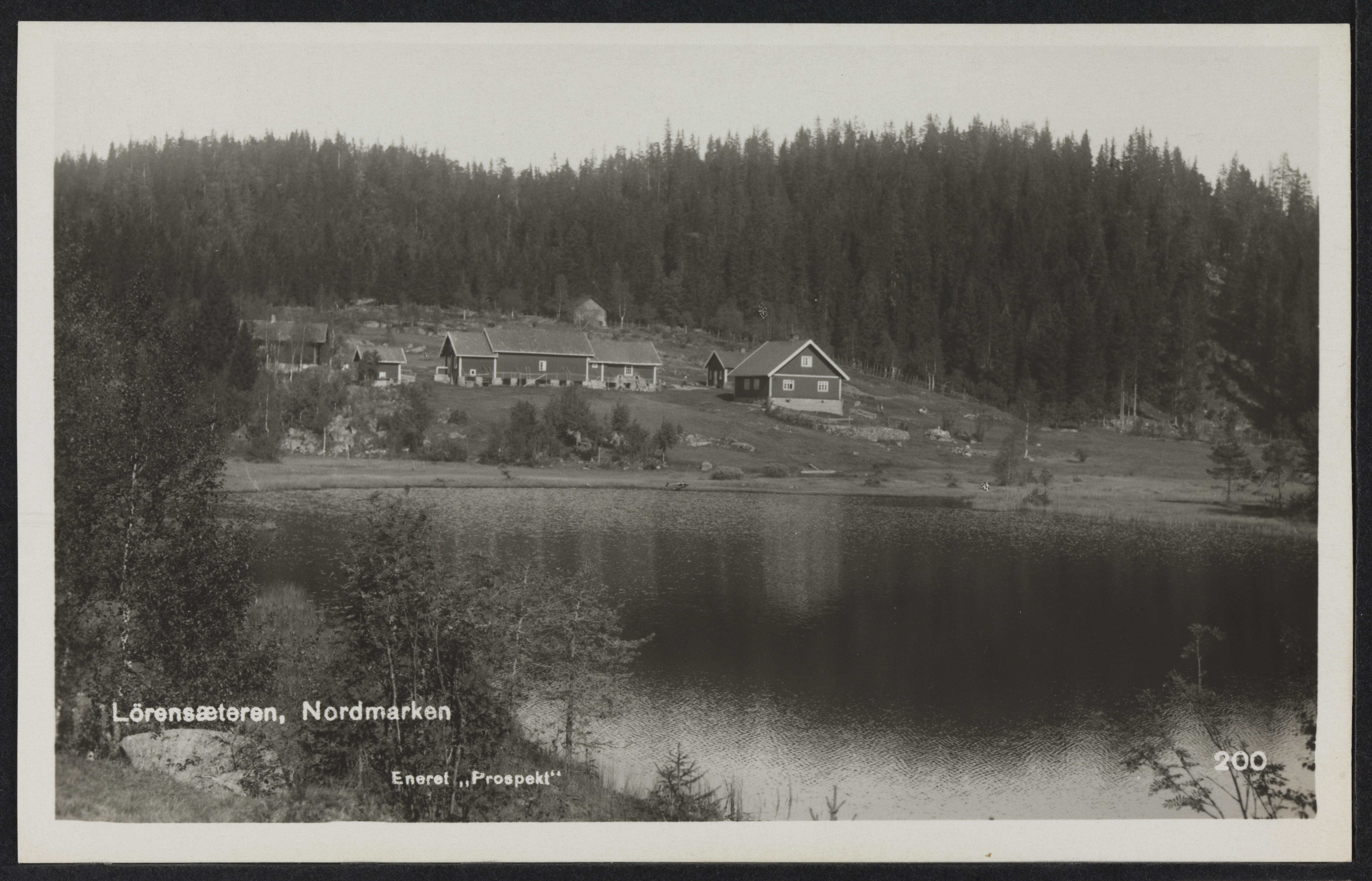 Bildet er hentet fra Nasjonalbibliotekets bildesamling Lørenseter,Nordmarka, Oslo, Oslo